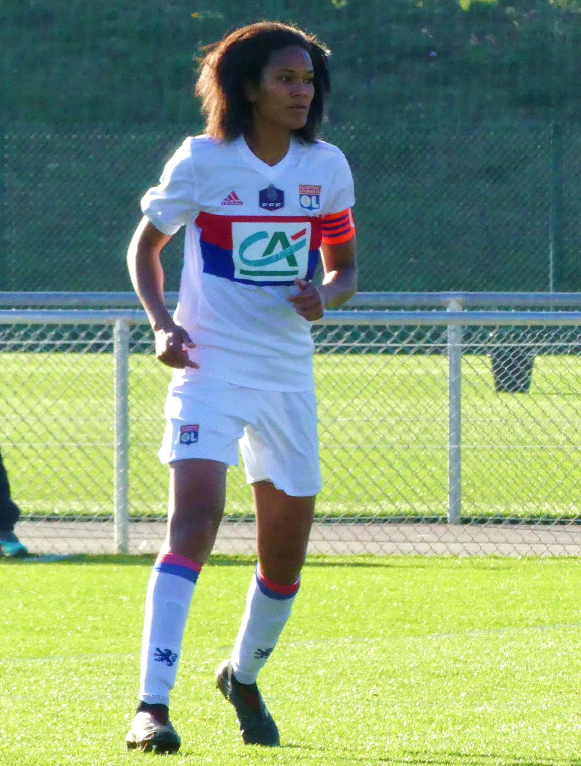 Wendie Renard le 28 janvier 2018 en Coupe de France face à Yzeure.